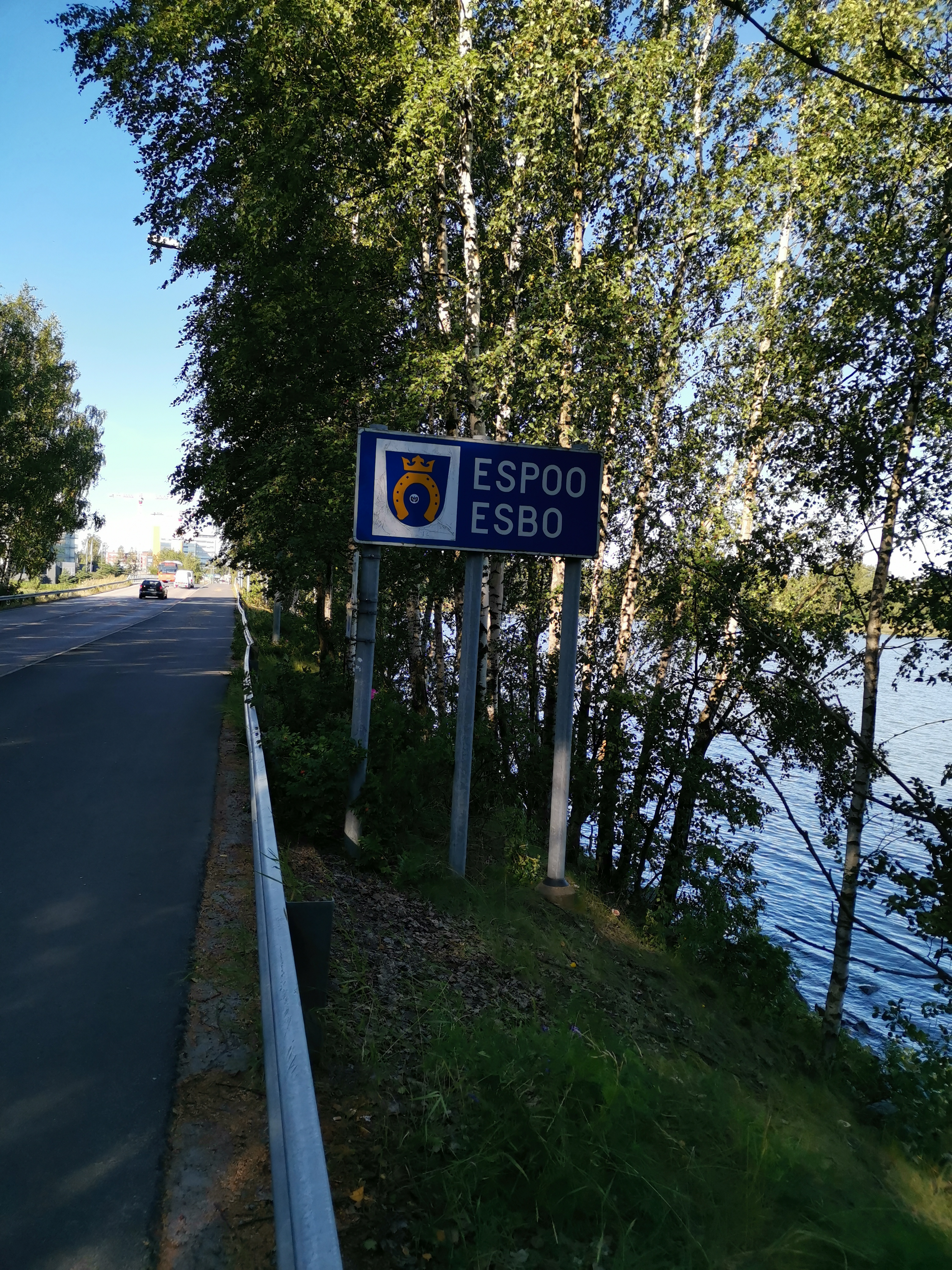 Kuusisaarentie Helsingin ja Espoon rajalla